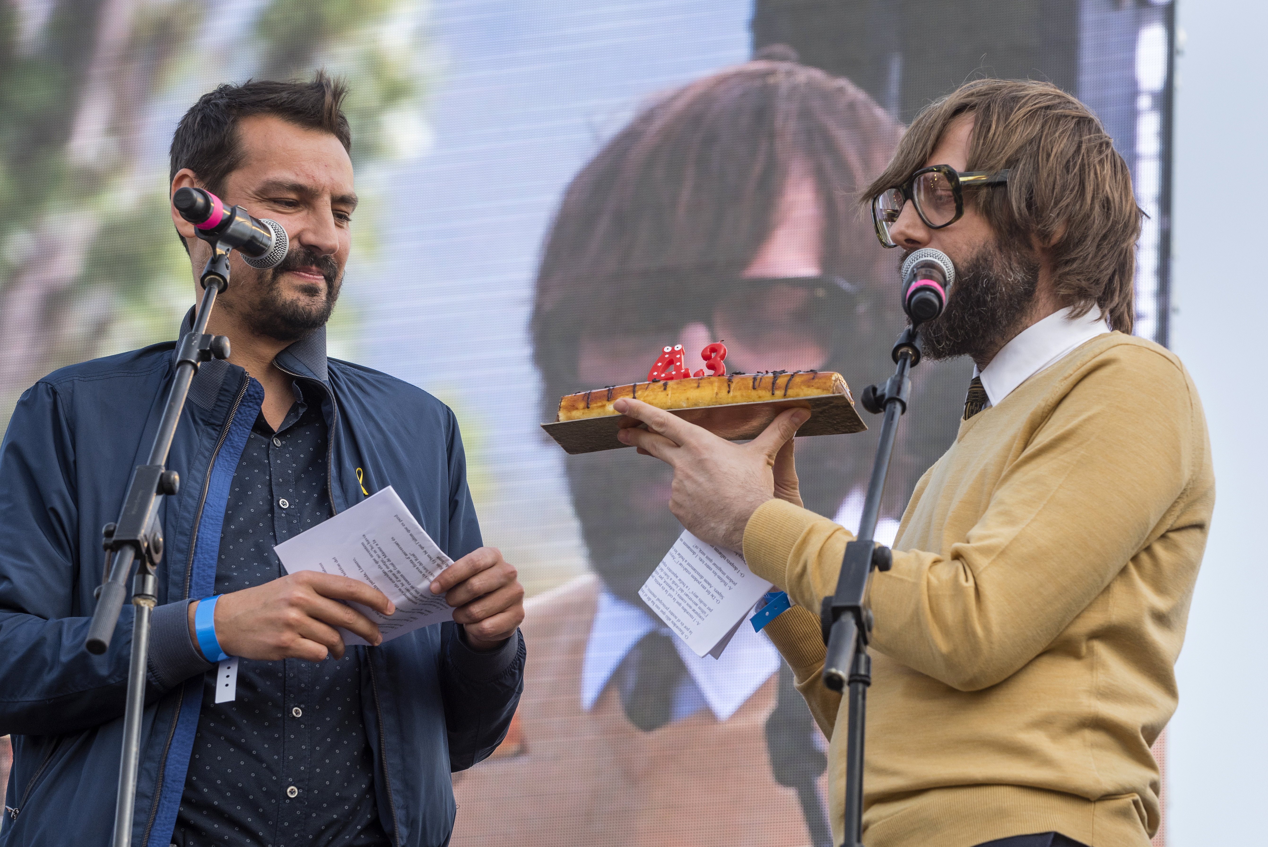 _DC73753